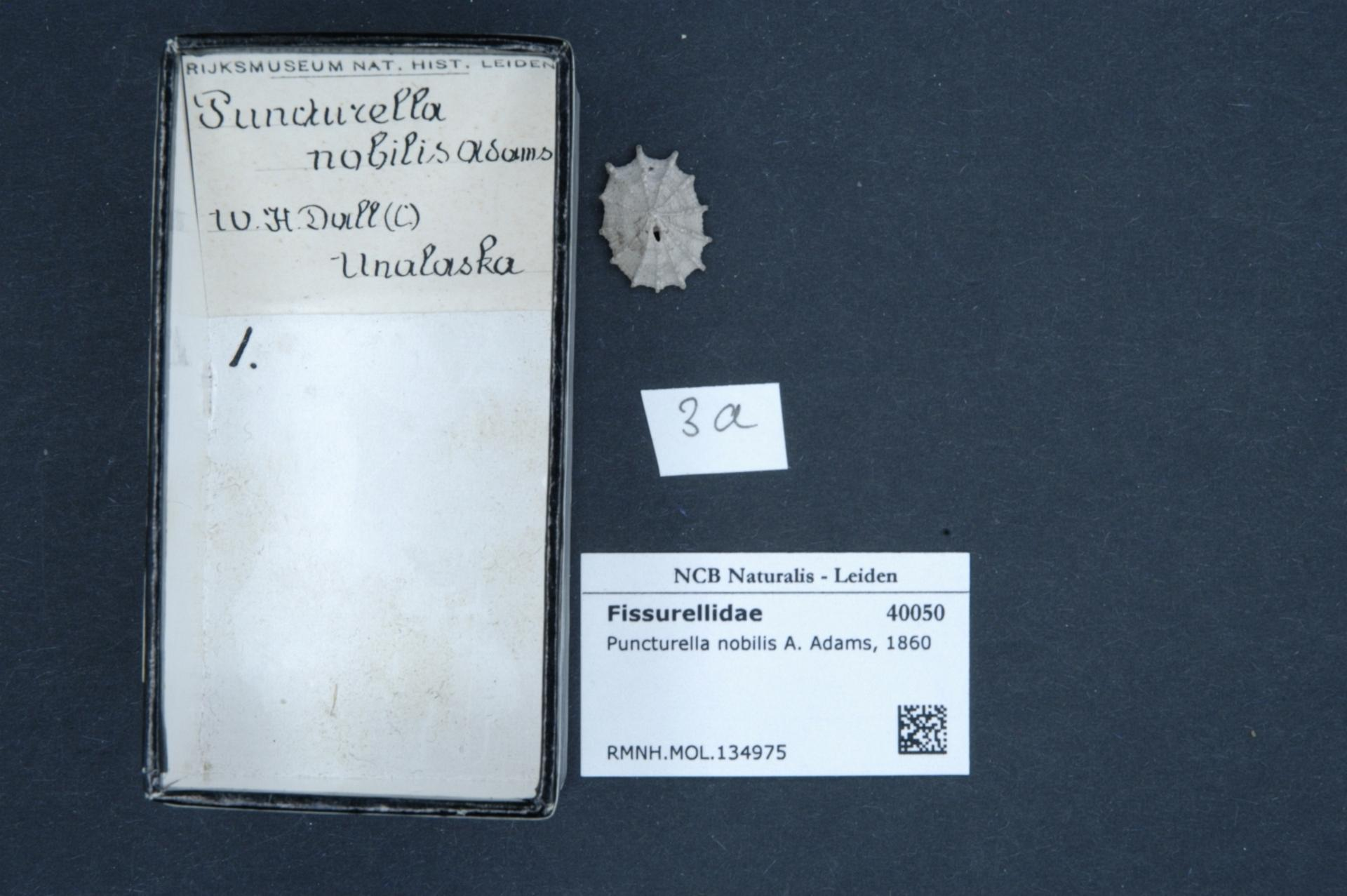 Puncturella nobilis A. Adams, 1860